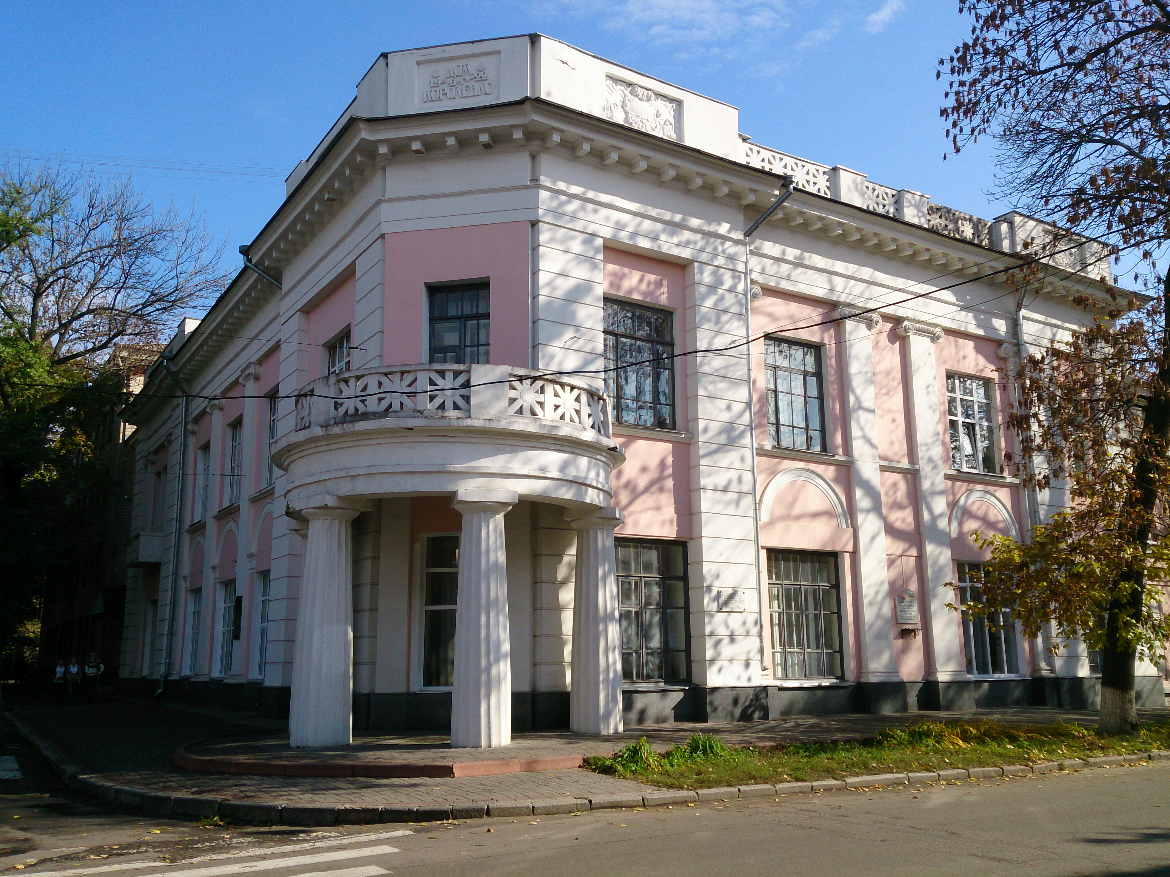 Будівля школи №10 в місті Полтава